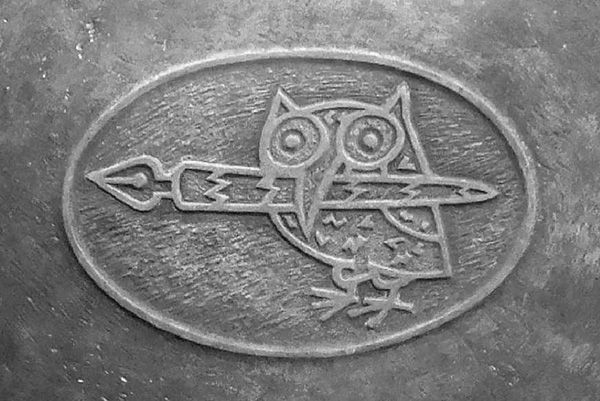 Motiv auf dem Grabstein von Lothar Otto auf dem Leipziger Südfriedhof